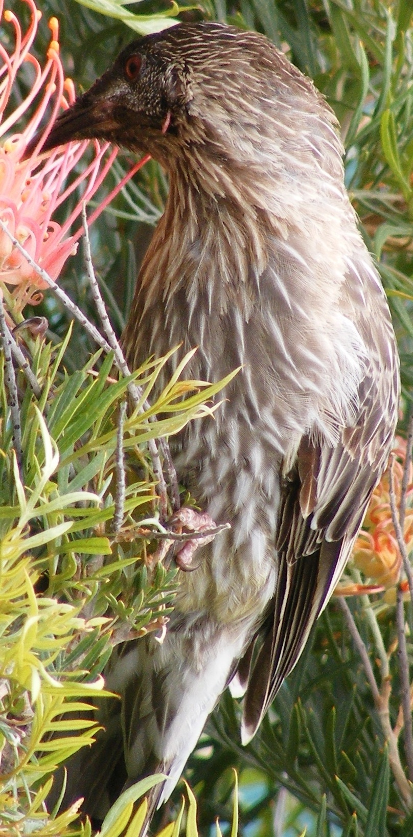 Wattlebird Australia